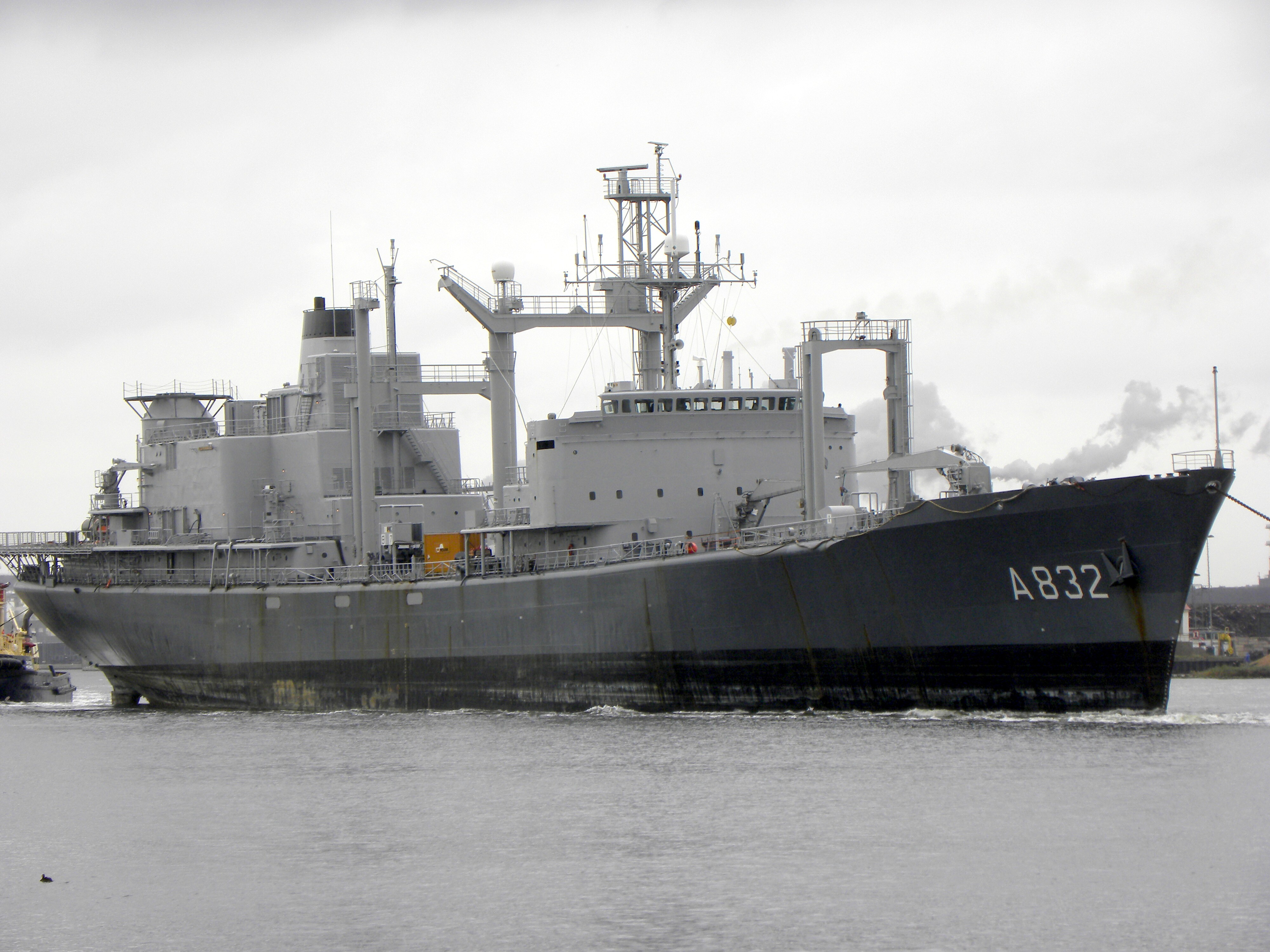 HNLMS Zuiderkruis A 832 replenishment ship Royal Netherlands Navy in service since 1975 here seen in IJmuiden